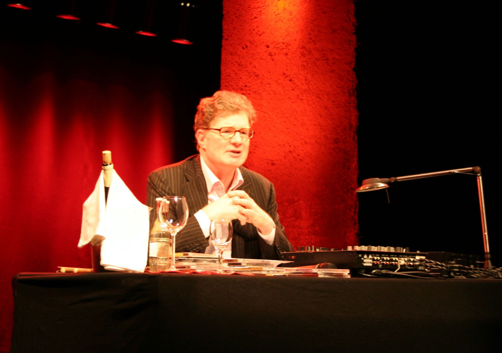 Roger Willemsen spielt unter der Überschrift "My Favourite Things" in der Mannheimer Alten Feuerwache Jazz-CDs ab und erzählt Geschichten dazu